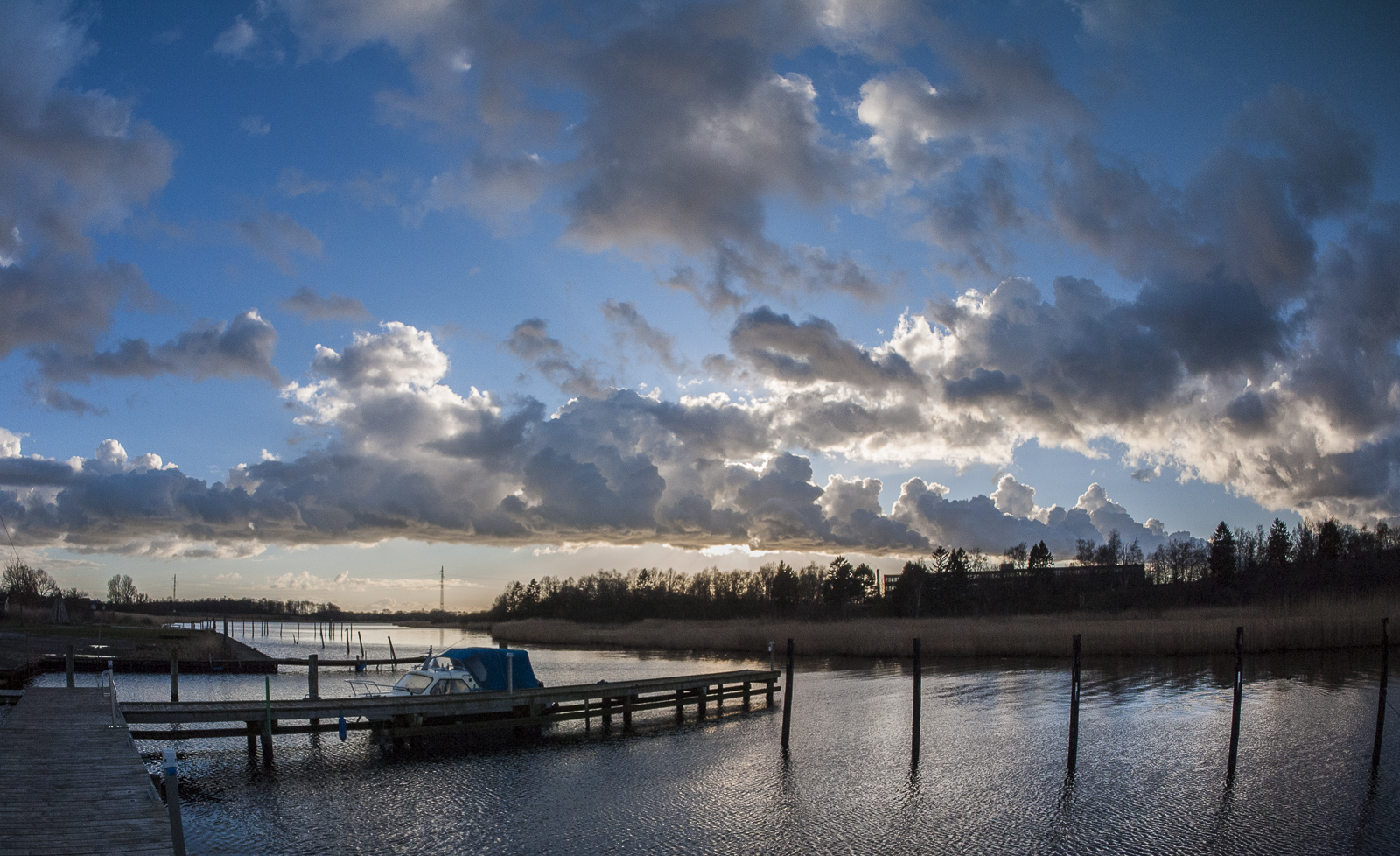 Appenæs Bådelaug